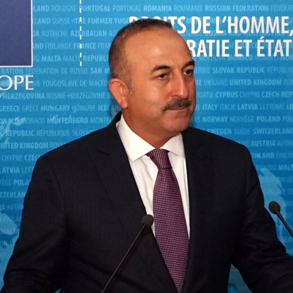 Marina Kaljurand, Mevlüt Çavuşoğlu et Thorbjørn Jagland en 2016